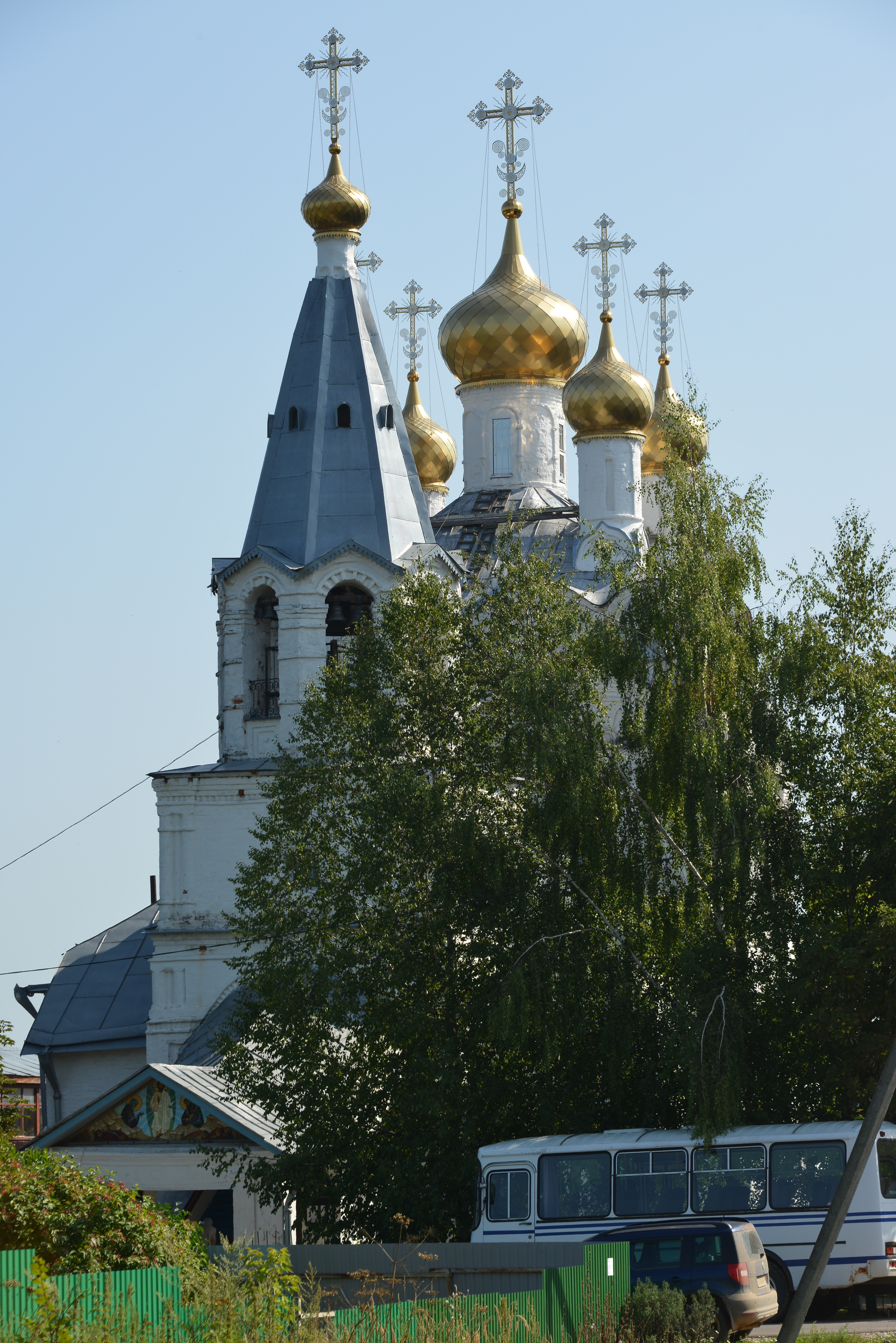 Церковь Спаса Преображения (Калужская область, Малоярославец, село Спас-Загорье)